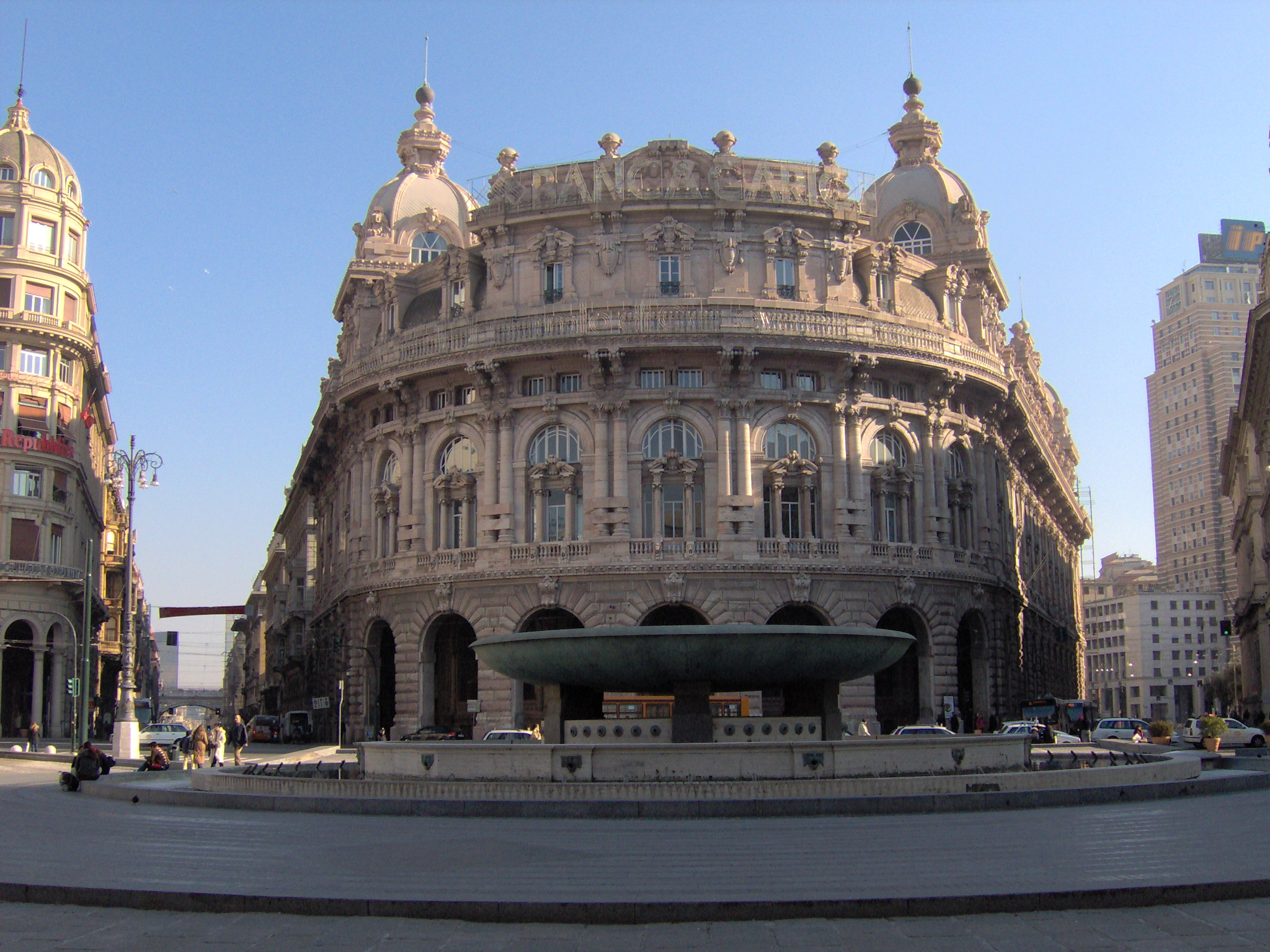 Genova, piazza De Ferrari